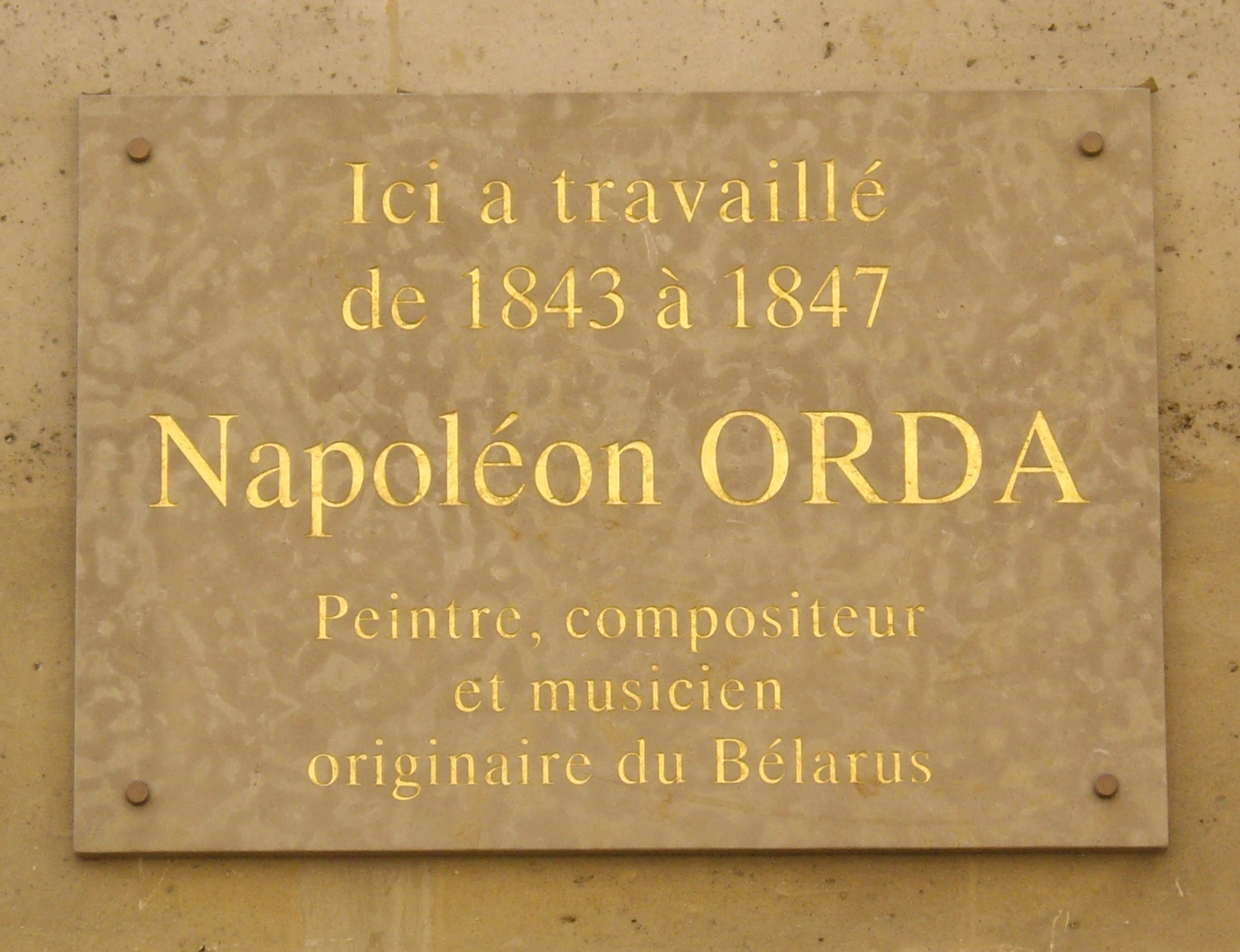 Plaque apposée au n° 9 de la rue Louis-le-Grand, Paris 2e. « Ici a travaillé de 1843 à 1847 Napoleon Orda, peintre, compositeur et musicien originaire du Bélarus. »